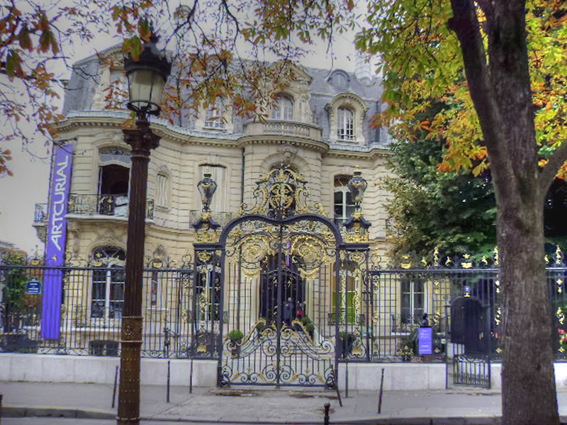 Hôtel Marcel Dassault, Paris, France.